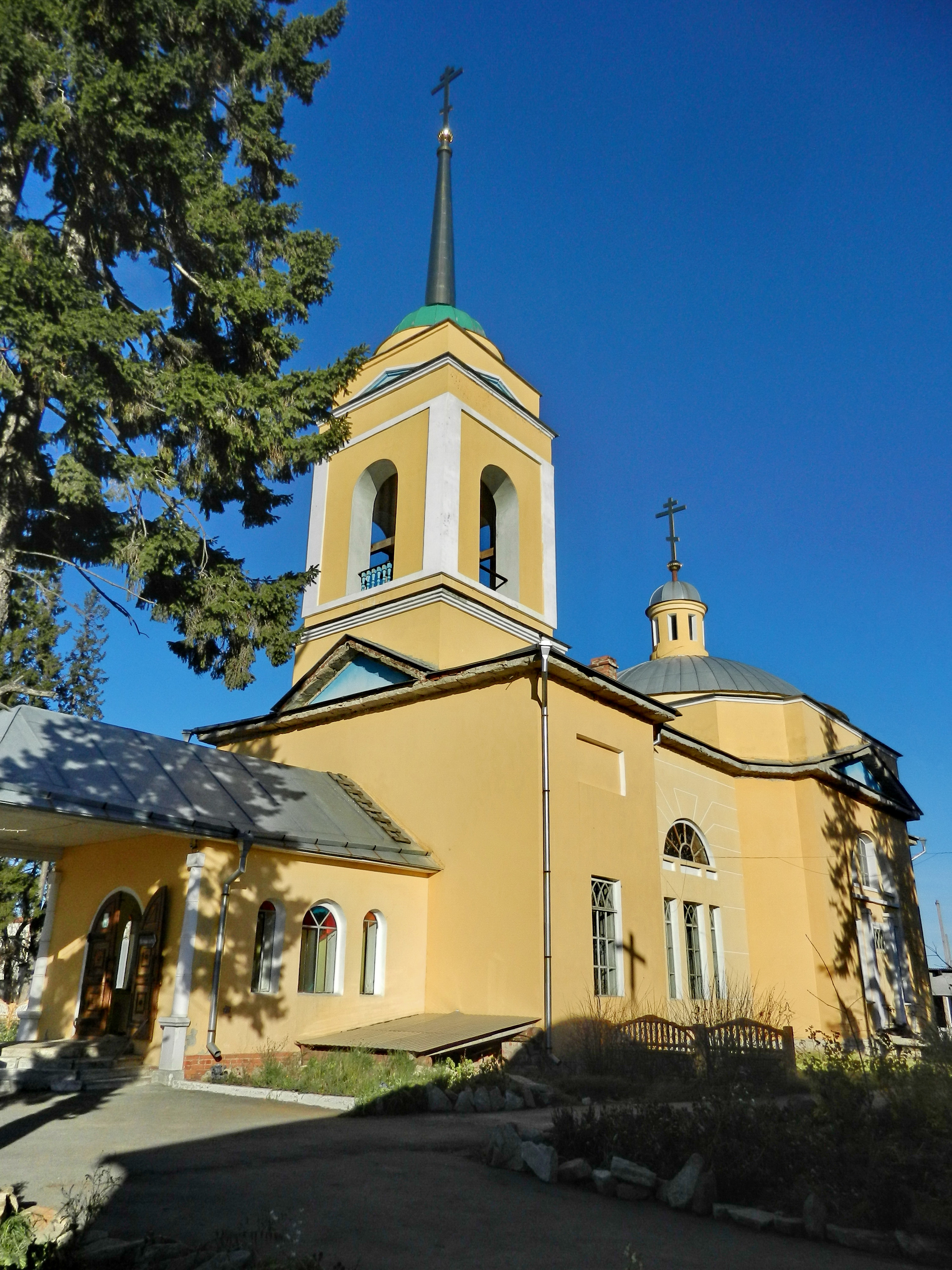 Горный Щит Церковь во имя Покрова Пресвятой Богородицы